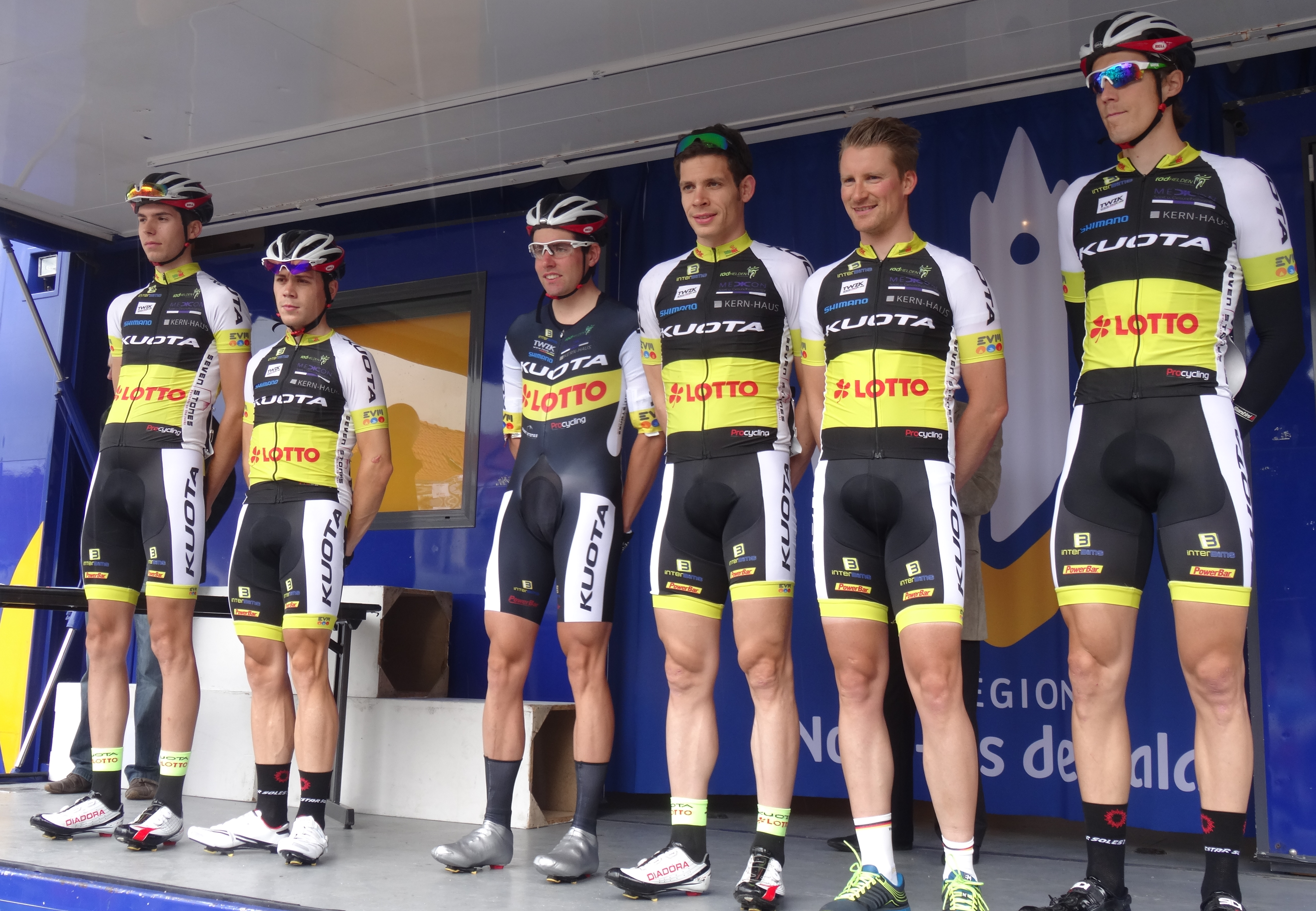 Reportage photographique réalisé le dimanche 13 juillet à l'occasion du départ et de l'arrivée de la Ronde pévéloise 2014 à Pont-à-Marcq, Nord-Pas-de-Calais, France.